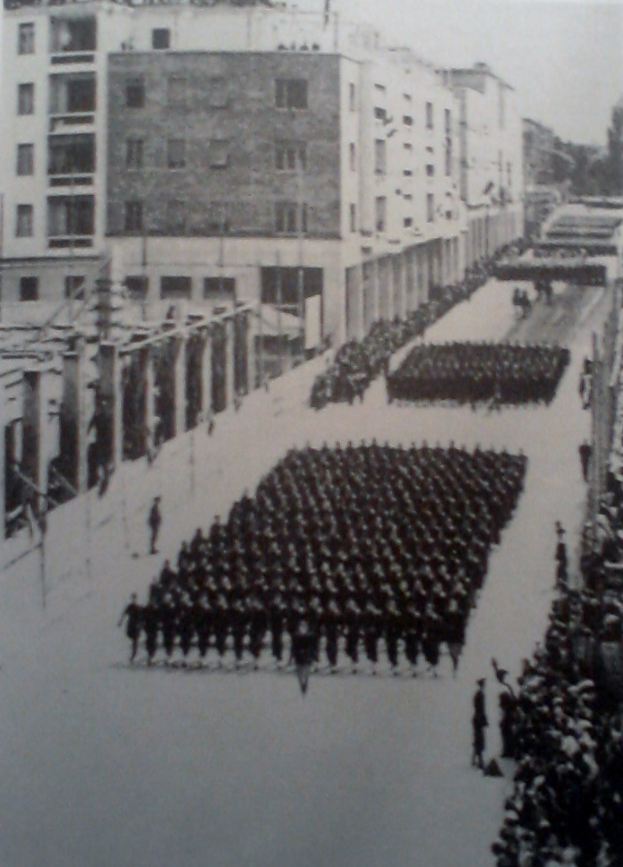 Parata Camice Nere in Corso Libertà a Bolzano